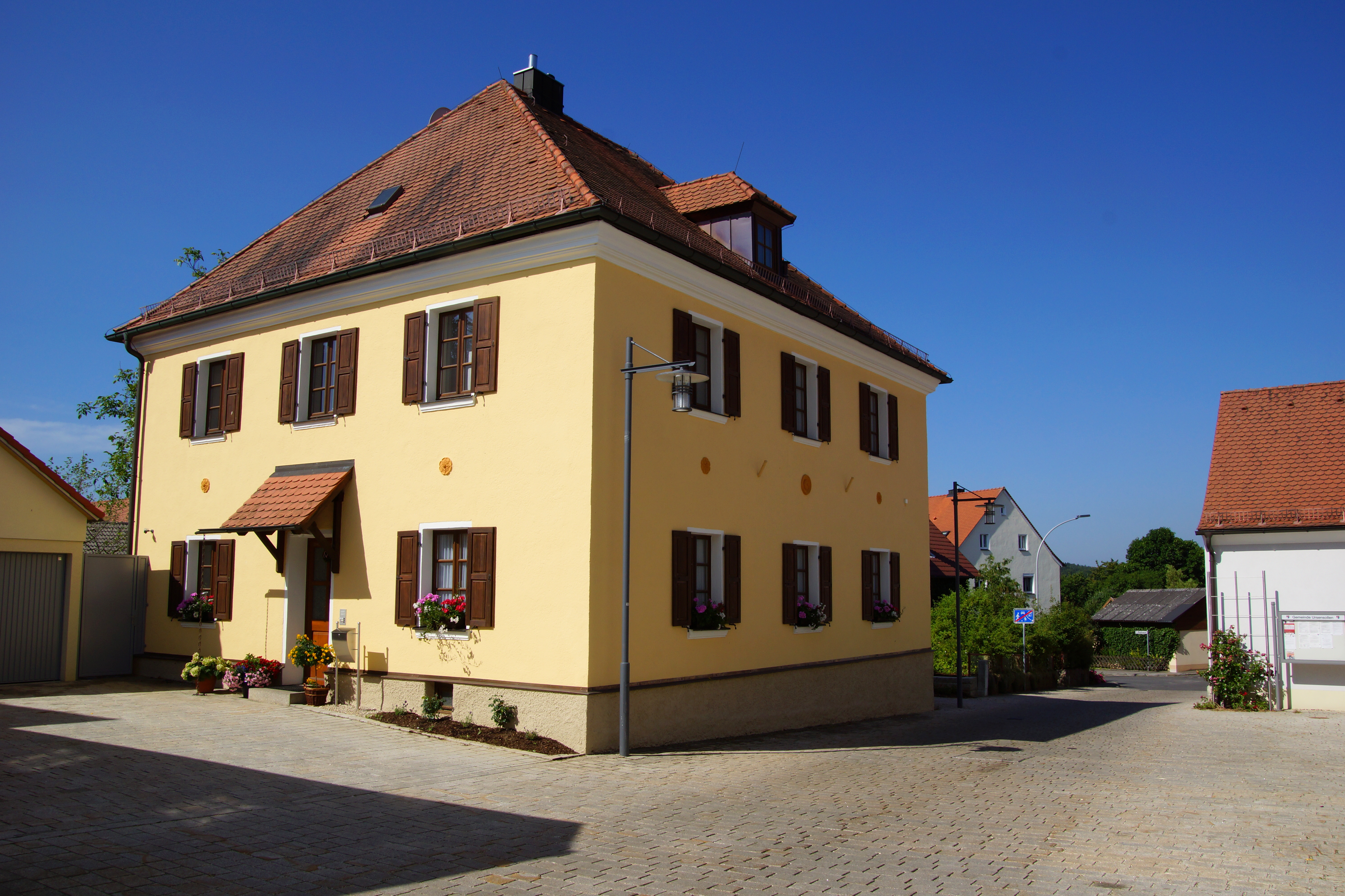 Die Gemeinde Ursensollen in der Oberpfalz